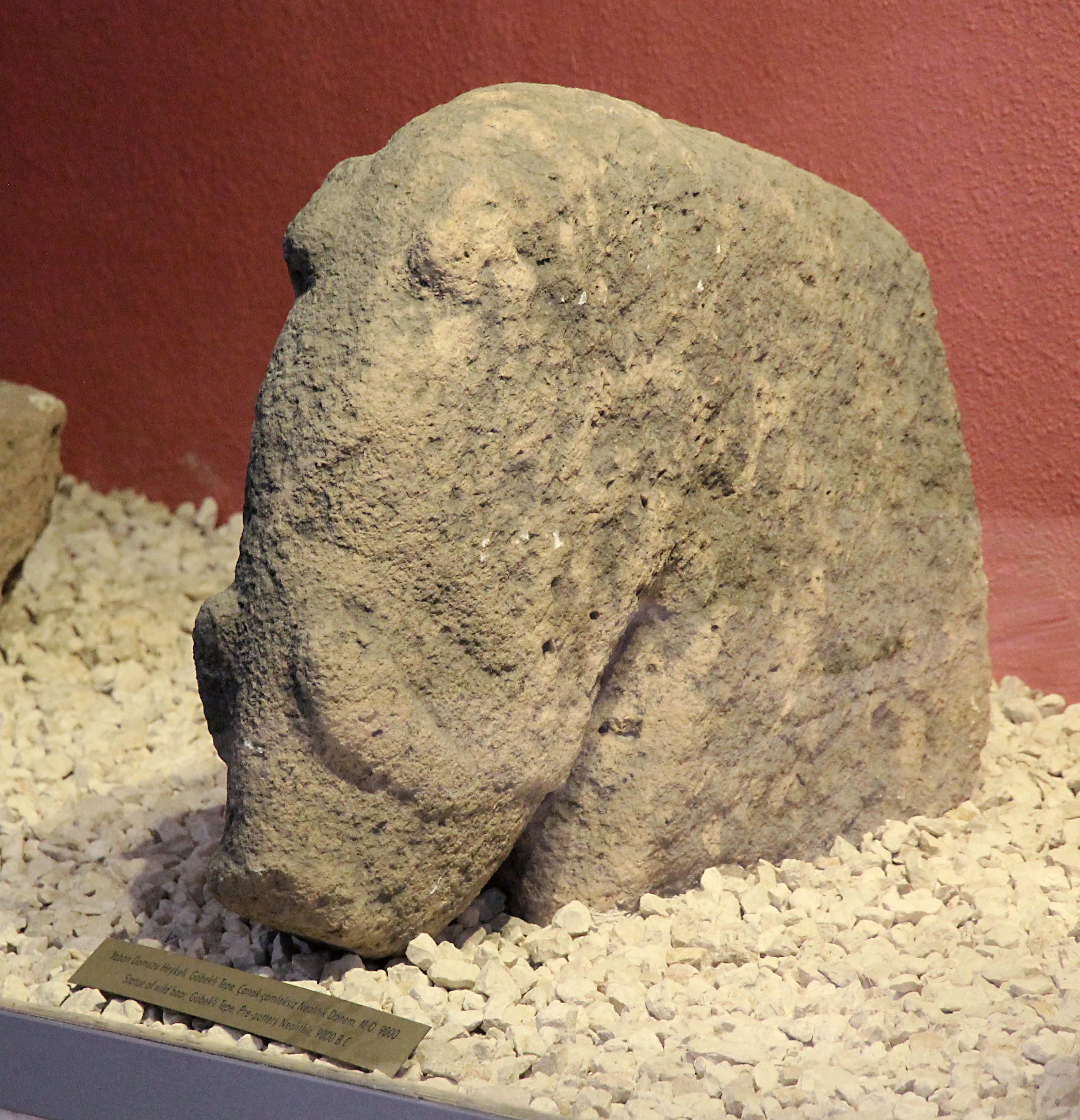 Archäologisches Museum Şanlıurfa, Südosttürkei, Schweineskulptur aus Göbekli Tepe